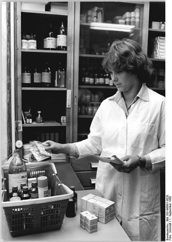 Meiningen, Stadtapotheke, Apothekerin ADN-ZB Schmidt-1.9.80 Bez. Suhl: Mit der Karl-Liebknecht-Medaille für gute Ergebnisse in der Berufsausbildung und für geleistete gesellschaftliche Arbeit wird am 2.9. die Apothekenfacharbeiterin Heike Kellner ausgezeichnet. Sie konnte ihre Lehre an der Medizinischen Fachschule in Suhl aufgrund hervorragender Leistungen zwei Monate früher beenden. Die 18jährige Heike Kellner arbeitet in der Stadtapotheke Meiningen.